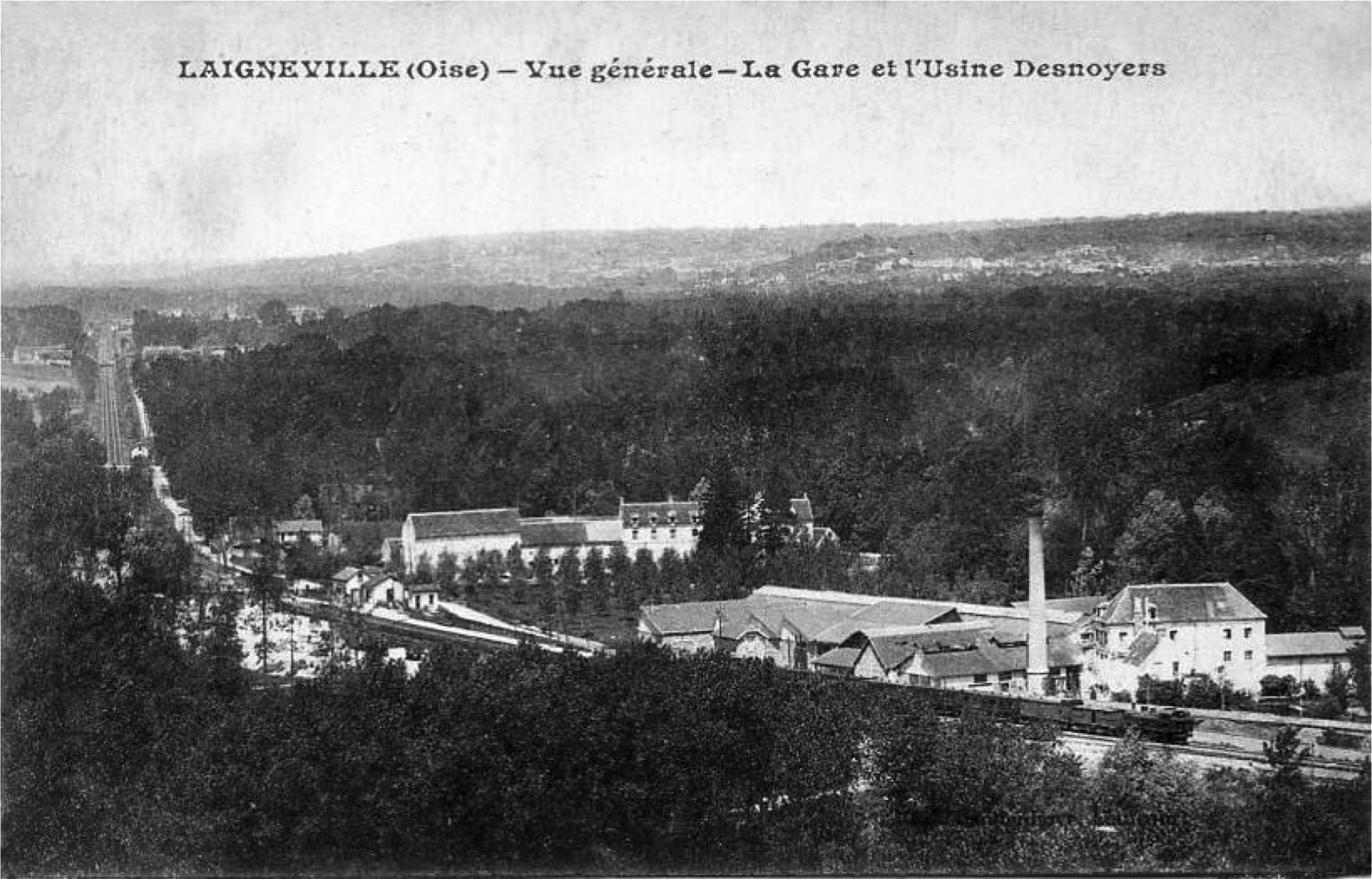 La gare vue dans son ensemble à côté de l'Usine Desnoyers.